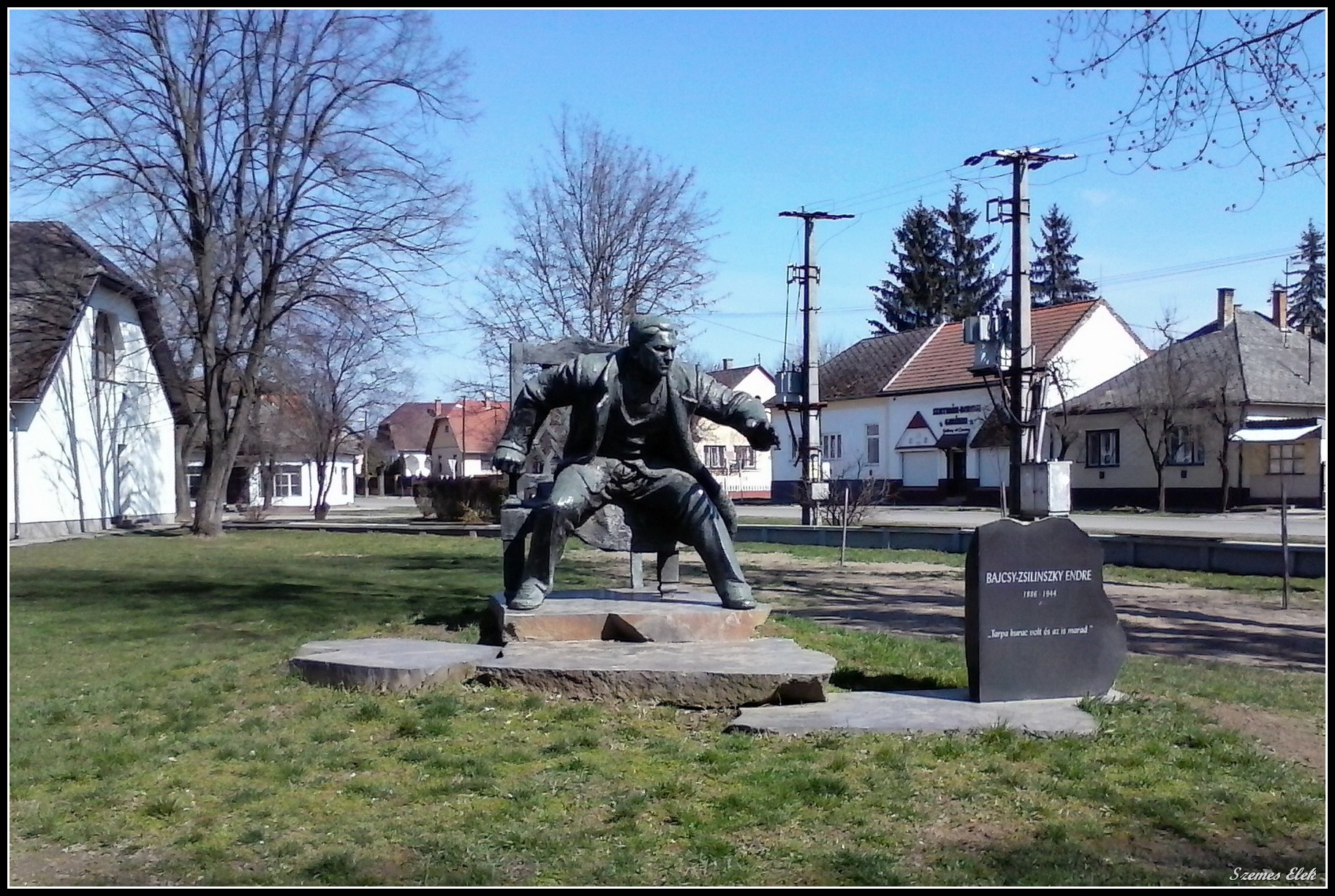 Tarpa, 4931 Hungary